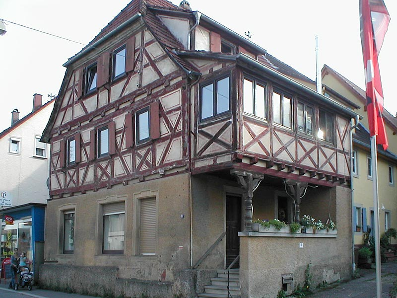 Historisches Fachwerkgebäude in Eschelbronn